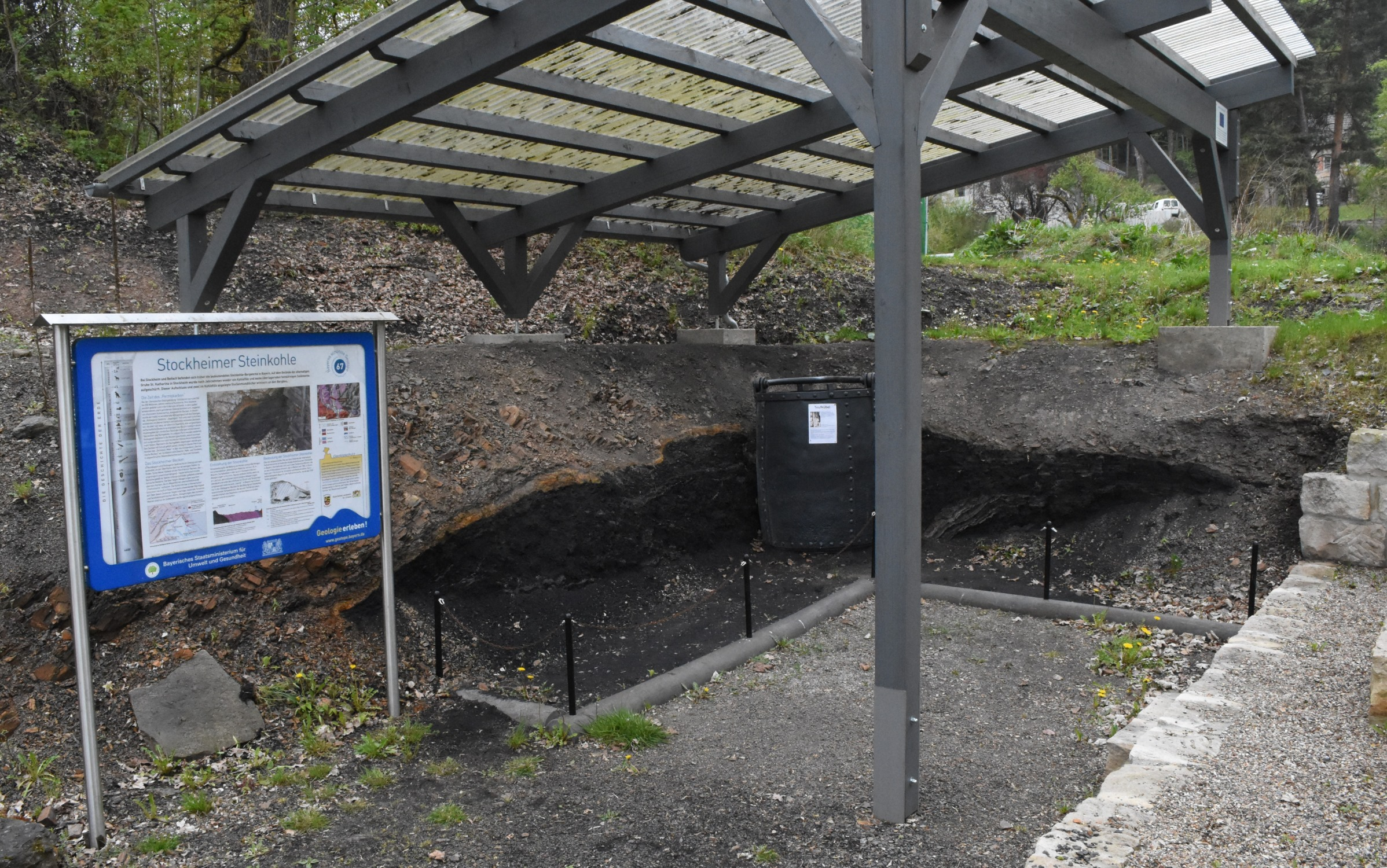 Stockheimer Steinkohle